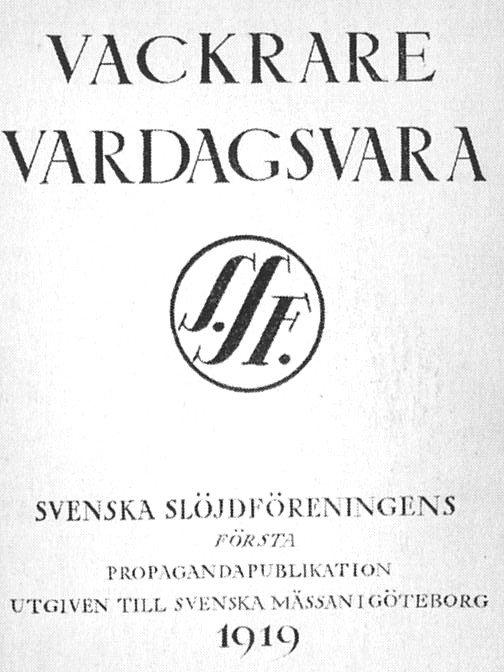 Programskrift "Vackrare vardagsvara" från 1919